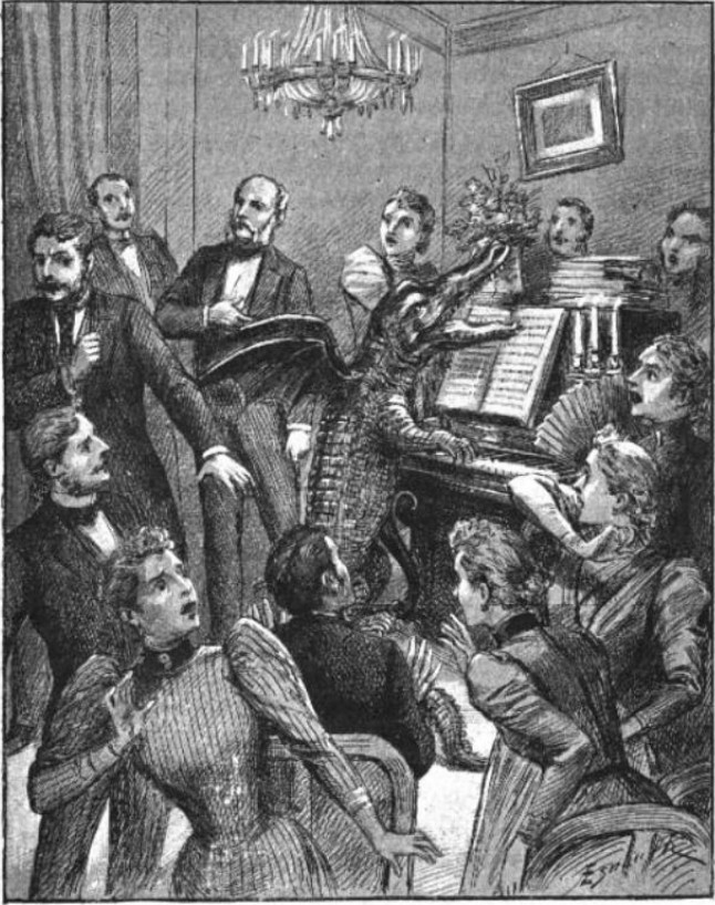 Illustration du Diable au XIXe siècle, page 609